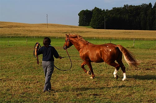 Marché-Concours 2004: A la longe